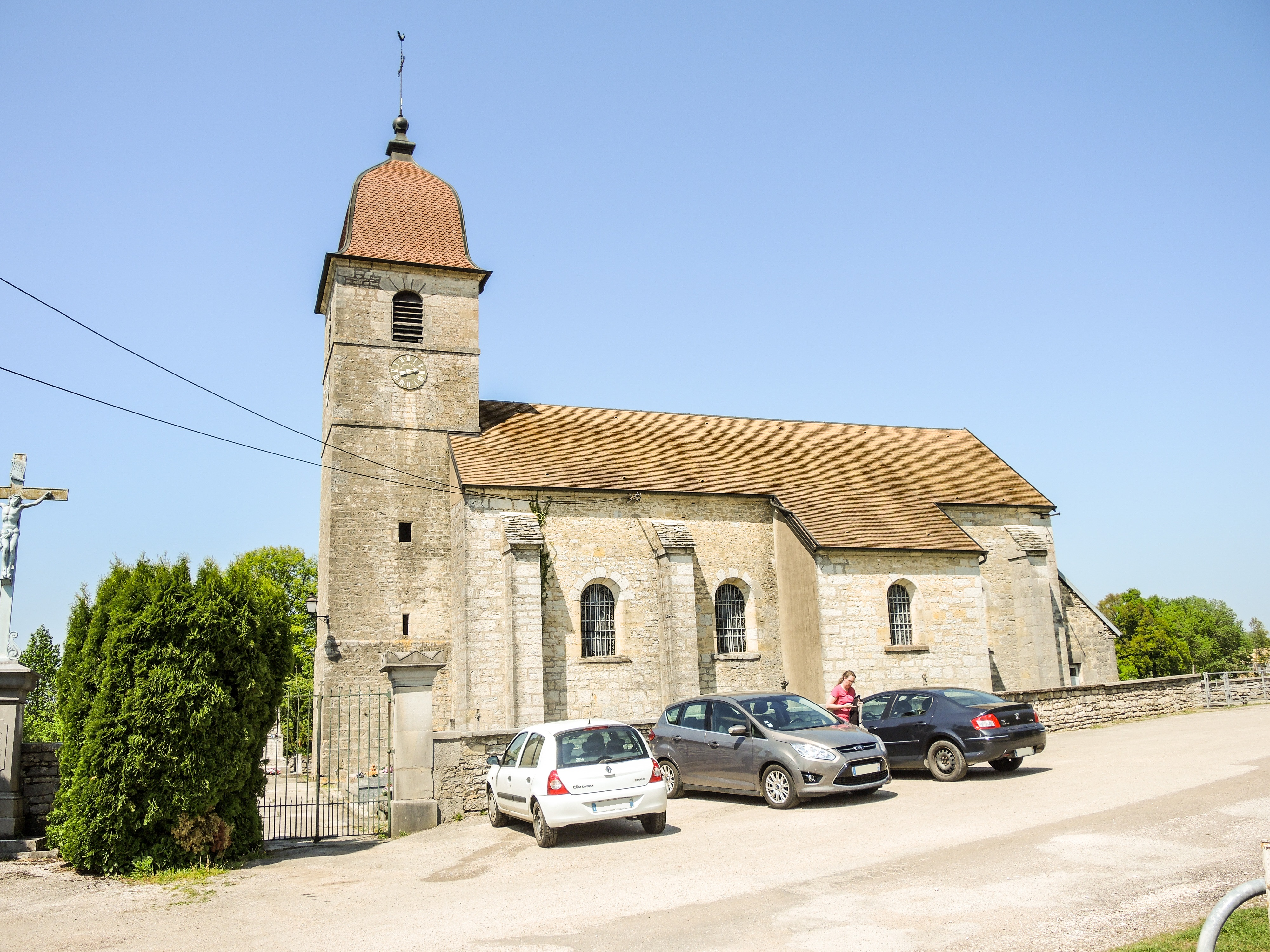 Eglise Saint-Nicolas de Saules. Doubs